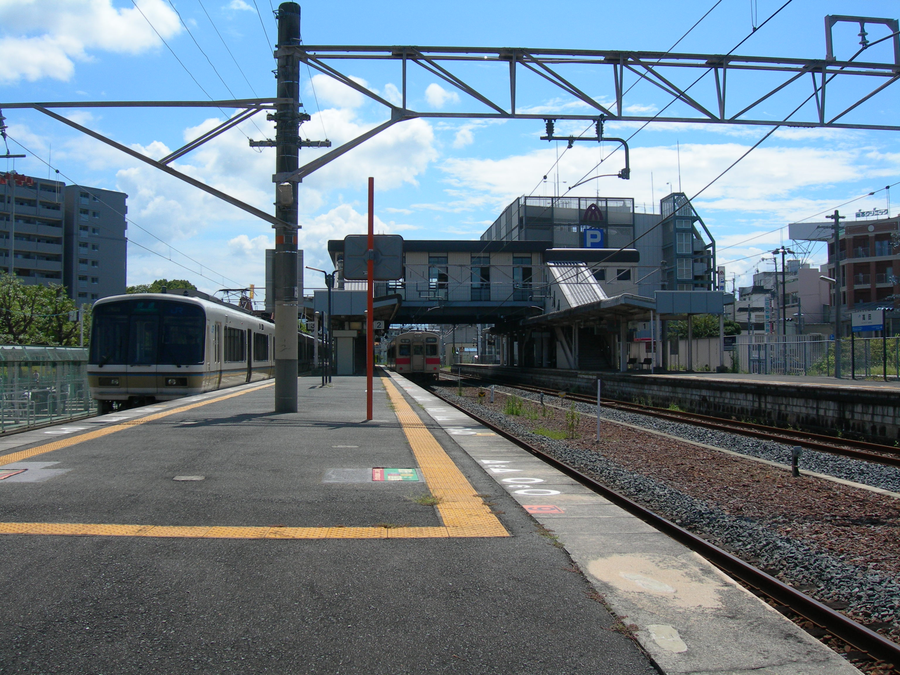 高田駅 (奈良県)プラットホーム